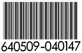 le code-barre de 47, héros de la série de jeu vidéo Hitman